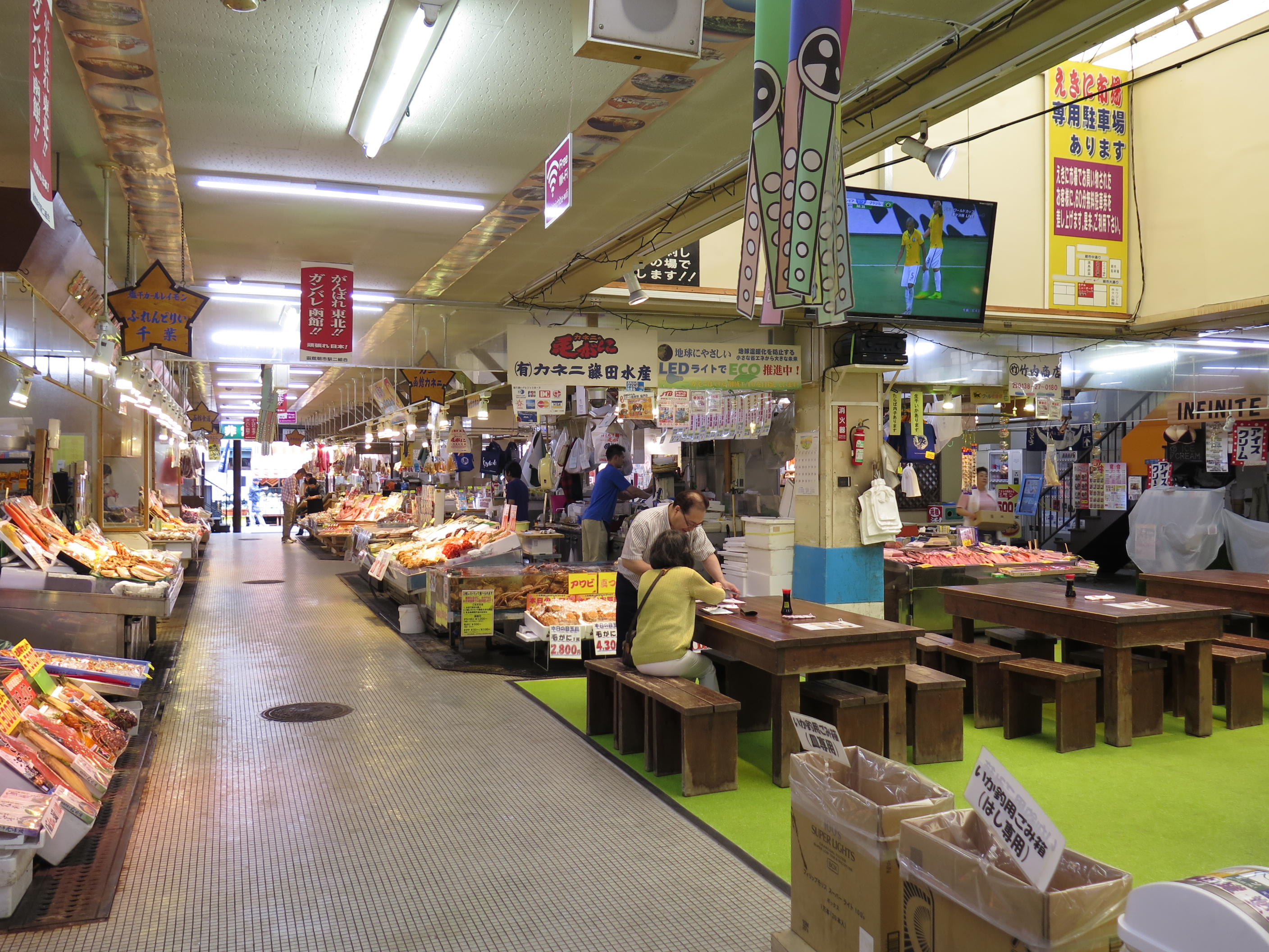 Hakodate Asaichi